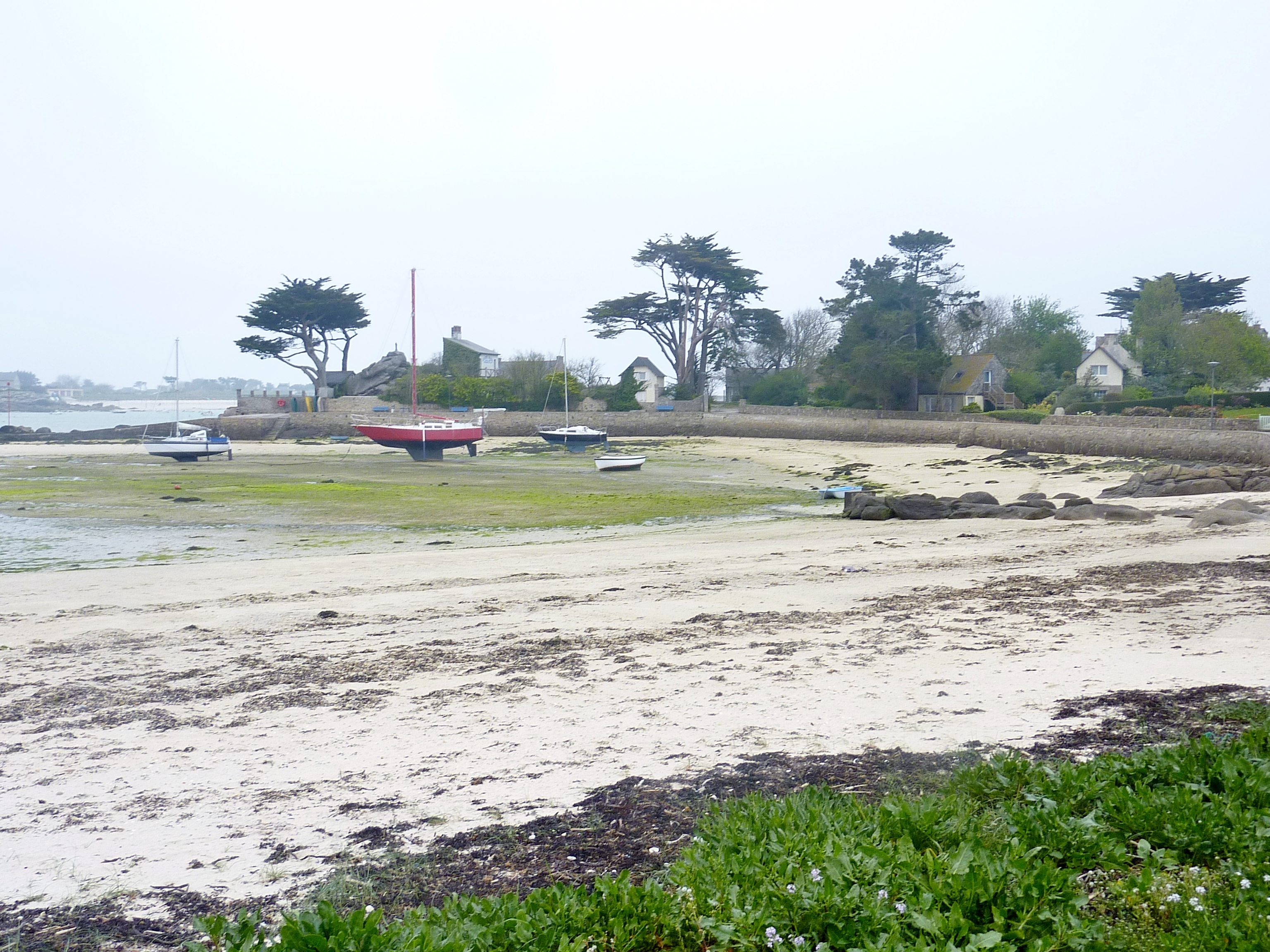 Brignogan : le port de Pontusval à marée basse